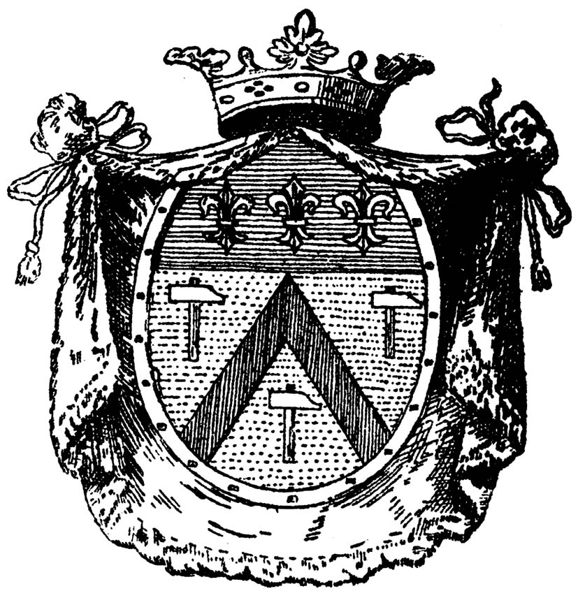 Ätten Tersmedens vapen på ett ex libris från 1800-talet.